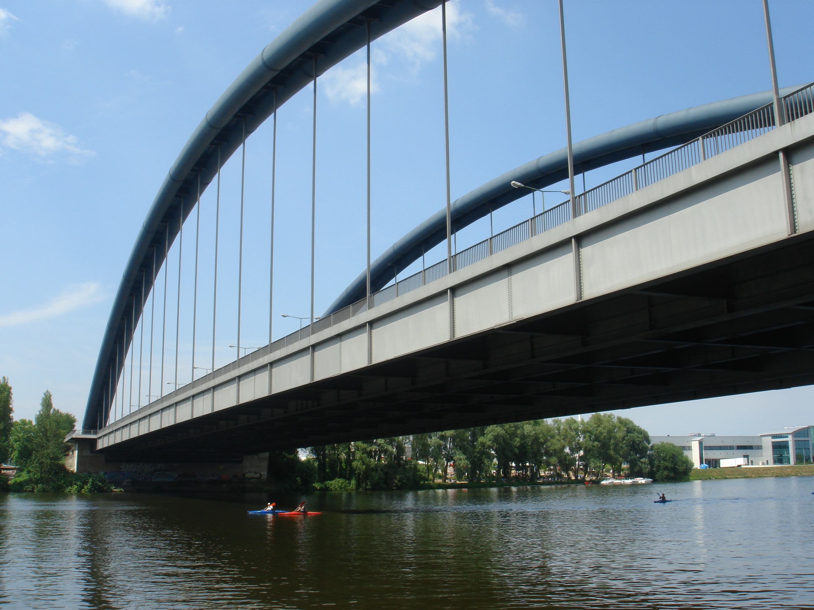 Kaiserleibrücke, Frankfurt